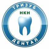 логотип волонтерського руху ТриЗуб Дентал